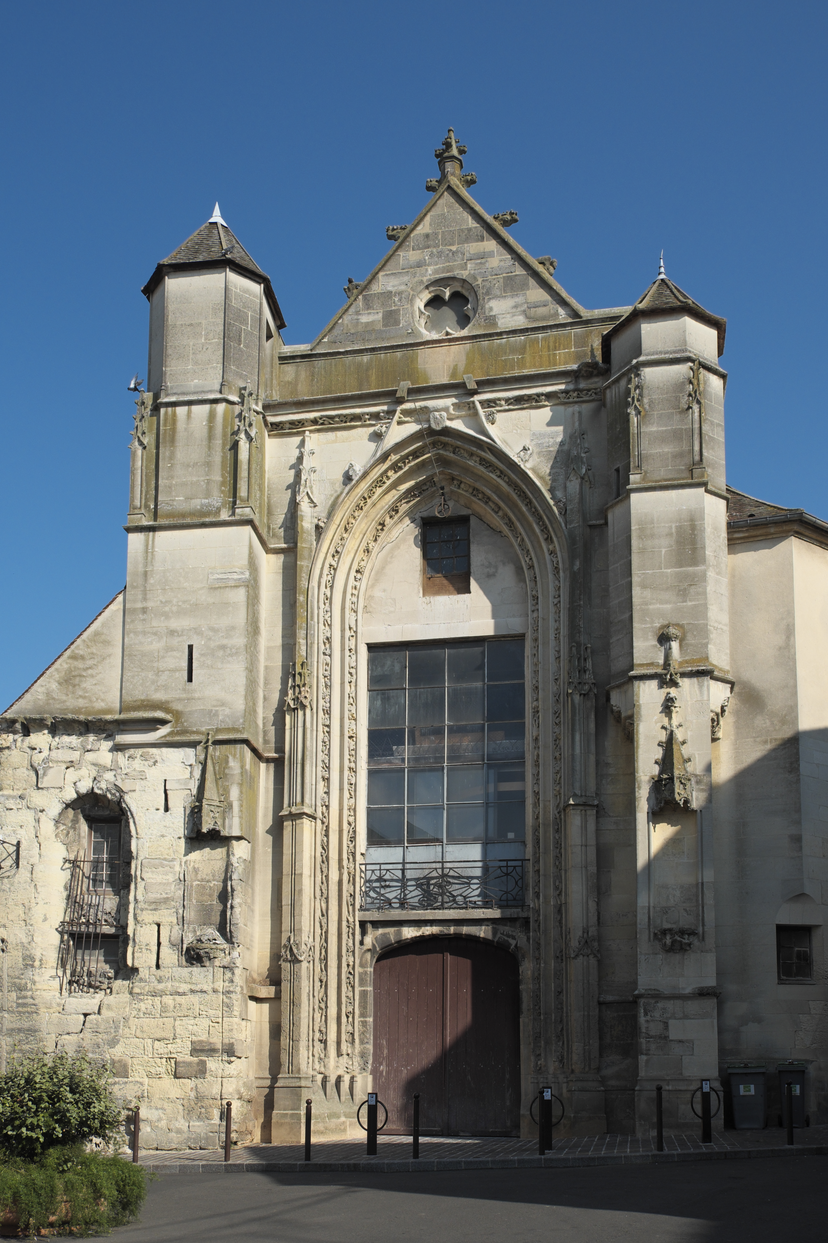 Ehemalige Pfarrkirche St-Fursy in Lagny-sur-Marne im Département Seine-et-Marne in der Region Île-de-France (Frankreich)